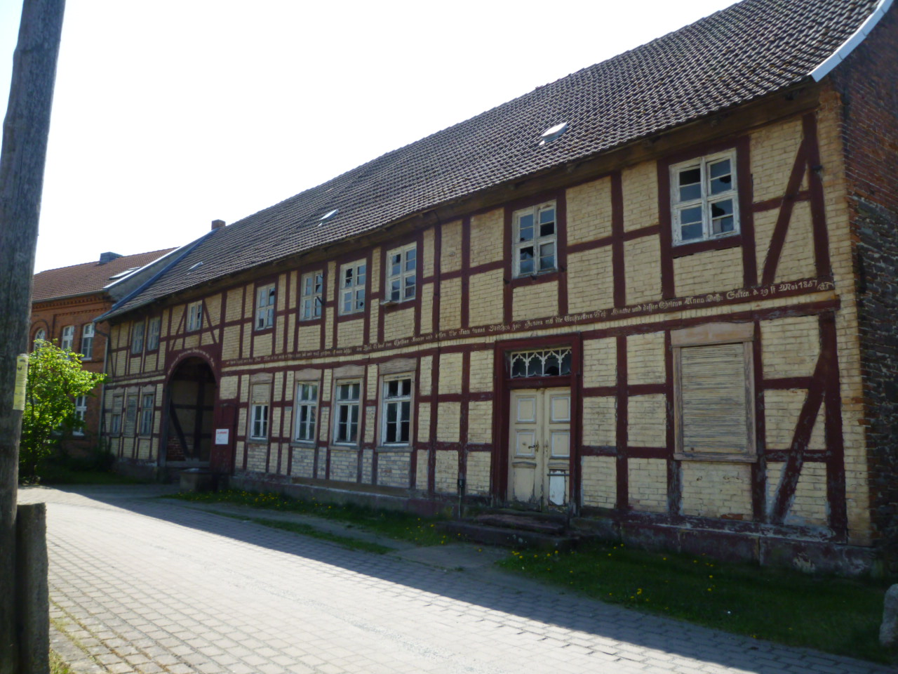 Calvörde-Berenbrock, Lindenstraße 3, denkmalgeschütztes Fachwerkhaus, Seitenansicht